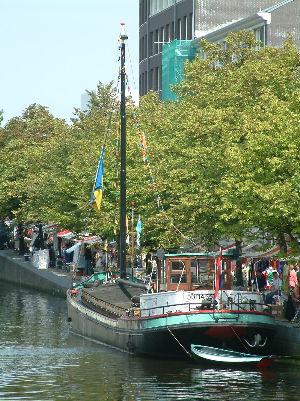 Stella Maris 03011455 uit Zoetermeer op de LVBHB reunie 2004 in Den Haag